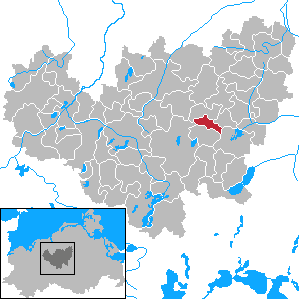 Dalkendorf in Mecklenburg-Vorpommern - District Güstrow